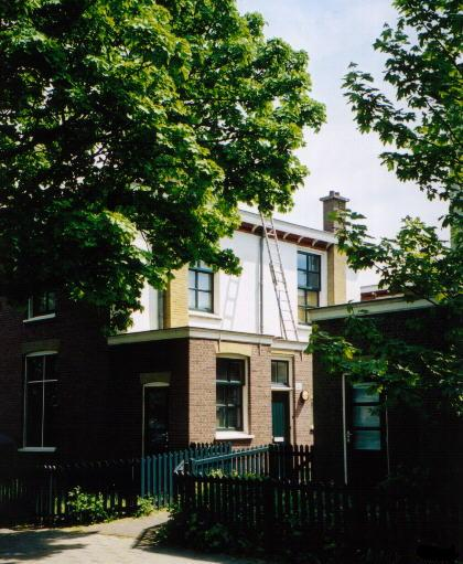 Van Hogendorpstraat, Den Haag, The Netherlands. 19e eeuws arbeidershofje.